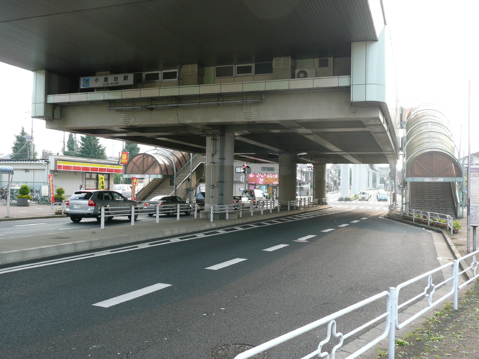 小倉台駅